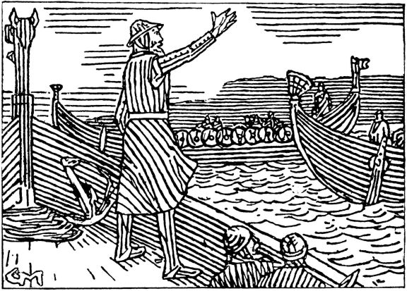 Gerhard Munthe: Illustration for Olav den helliges saga, Heimskringla 1899-edition. nn: «Torberg Arnesson helsar brørne sine velkomne.» .